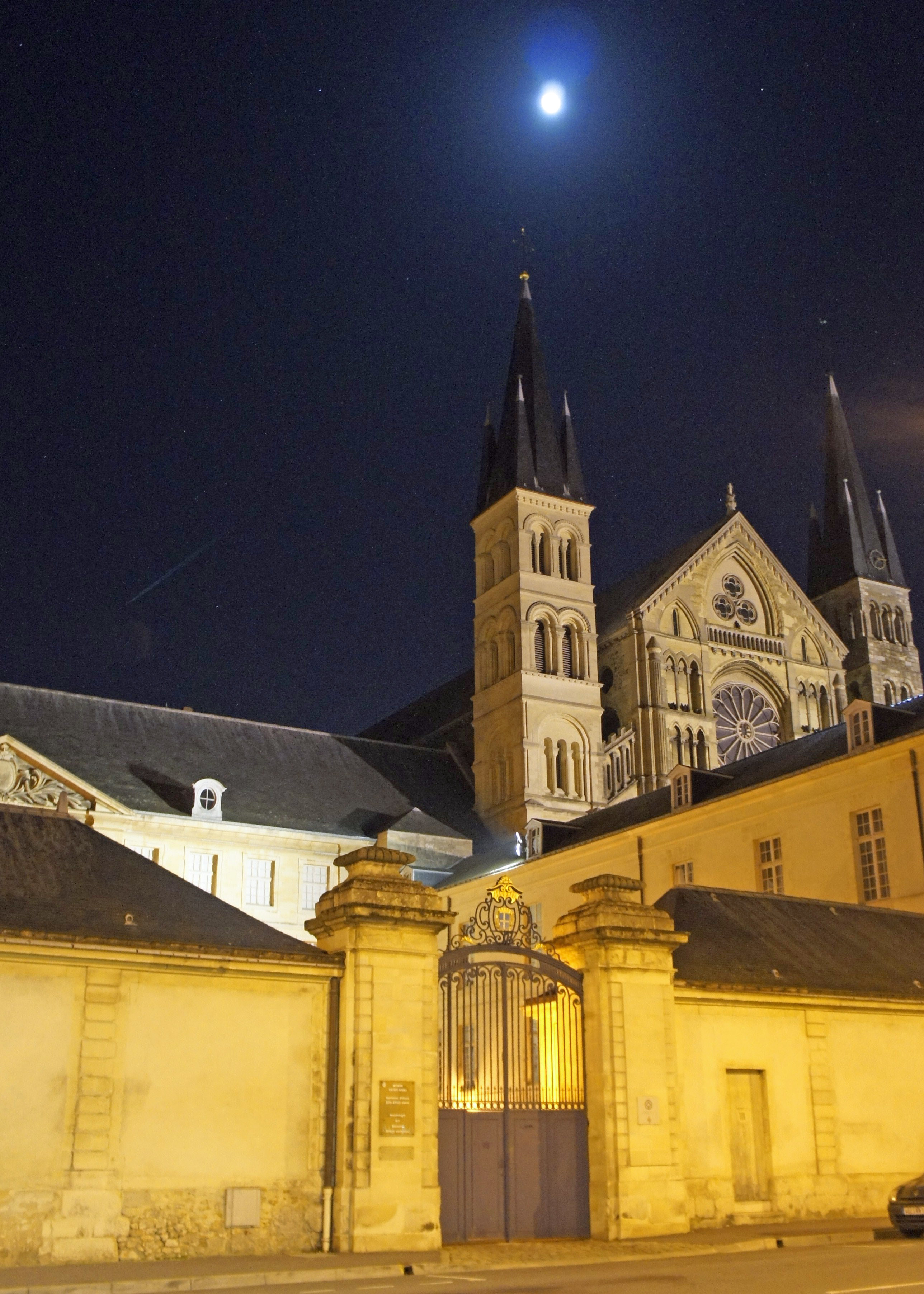 Nuit, le musée de l'abbaye st-Remi en 2012.